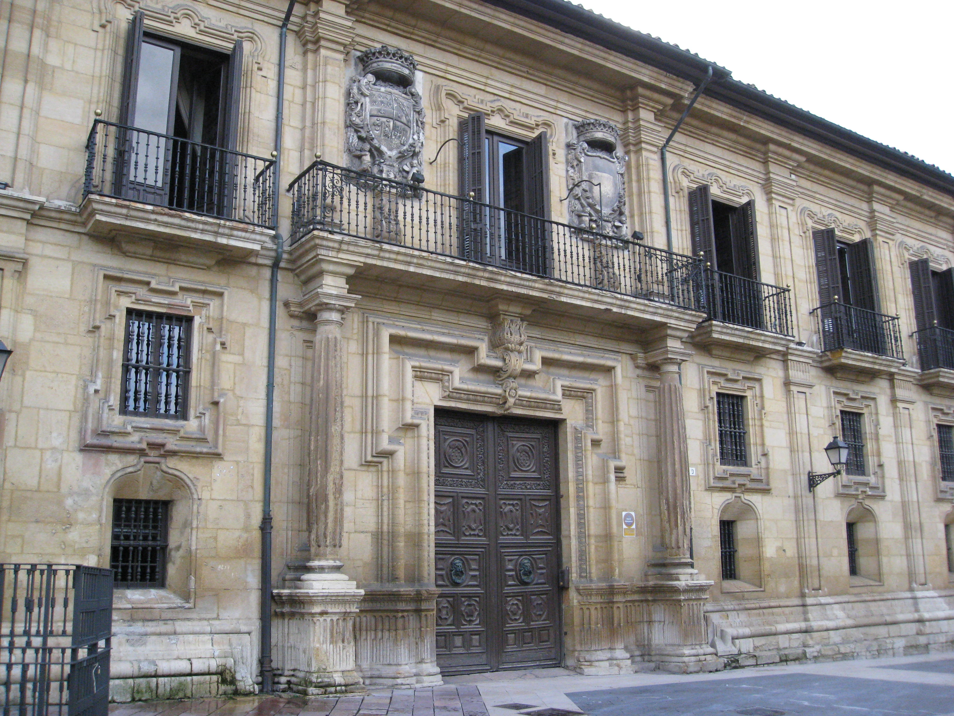 Palacio del Marqués de San Feliz